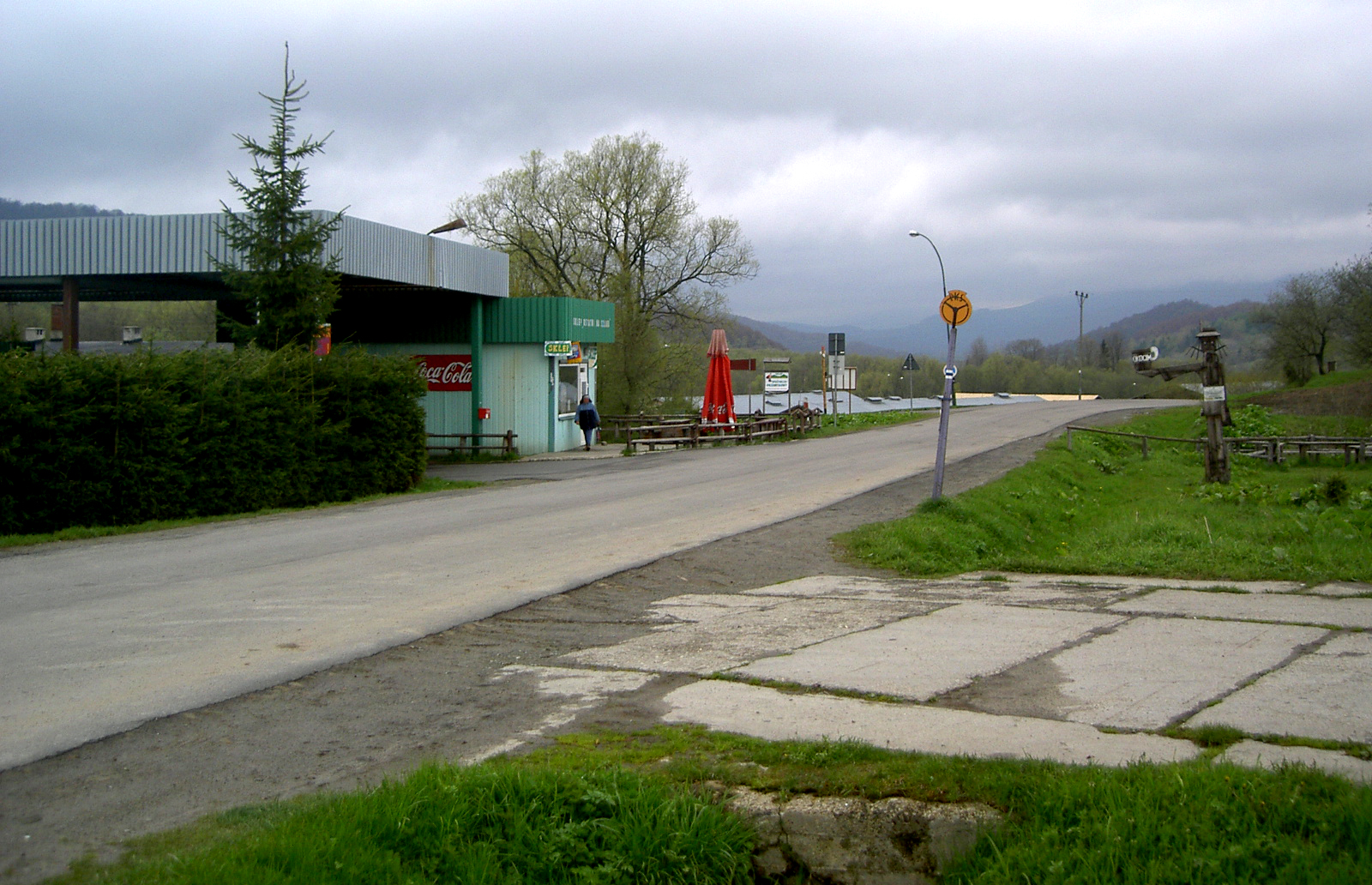 Wołosate, Poland